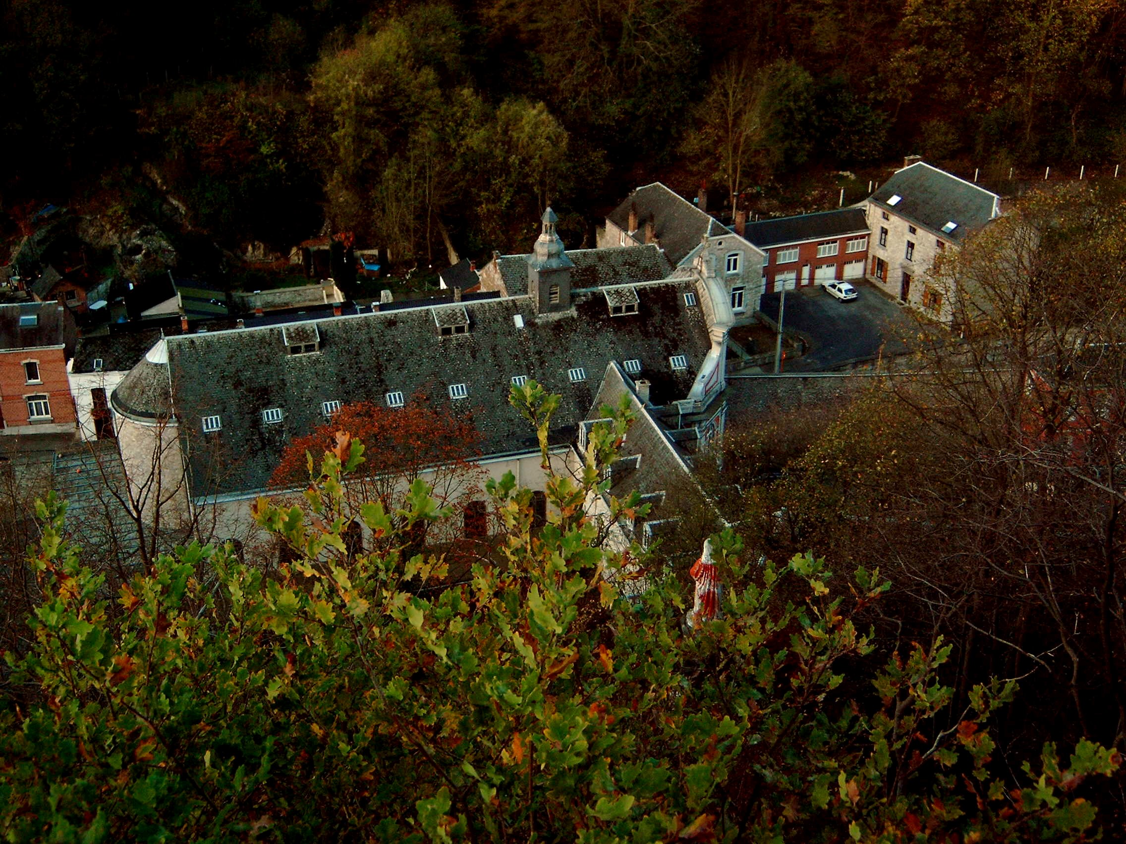 De kapel van de abdij van Saint-Berthuin, Malonne.